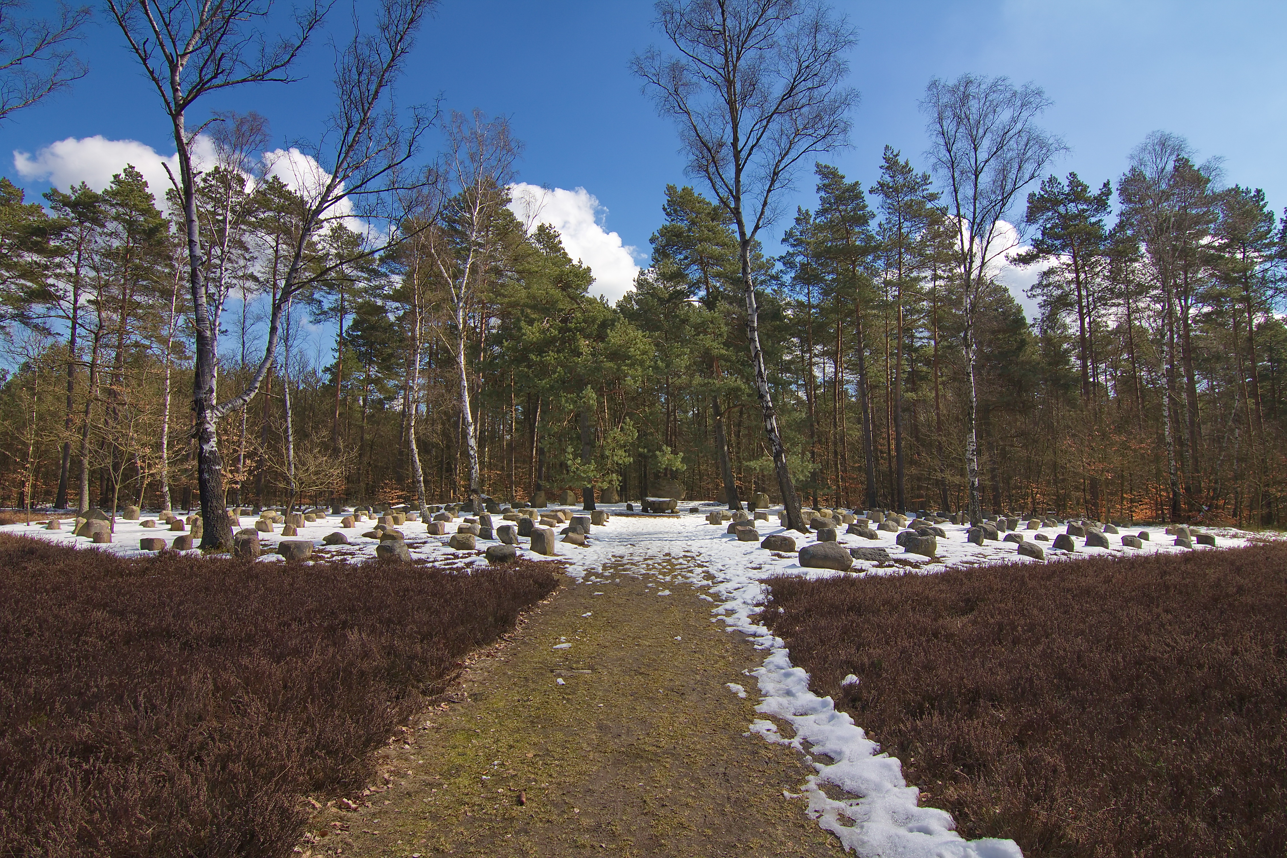 Am Denkmal desLandtagsplatzes in Hösseringen (Suderburg) war im Mittelalter (1532–1652) Versammlungsstätte des Landtags des Fürstentums Lüneburg. Die Lüneburger Ritterschaft stellte hier im Jahr 1902 einen Gedenkstein auf. In den 1930er Jahren wurde der Platz in seine heutige Form umgestaltet. Er besteht seitdem aus zahlreichen Findlingen aus den Orten und mit den Ortsnamen des damaligen Kreises Uelzen.